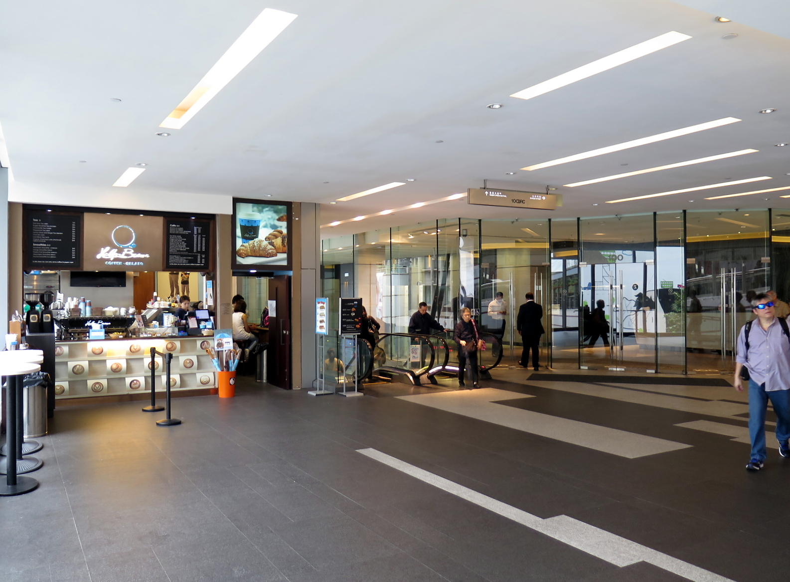 100 QRC